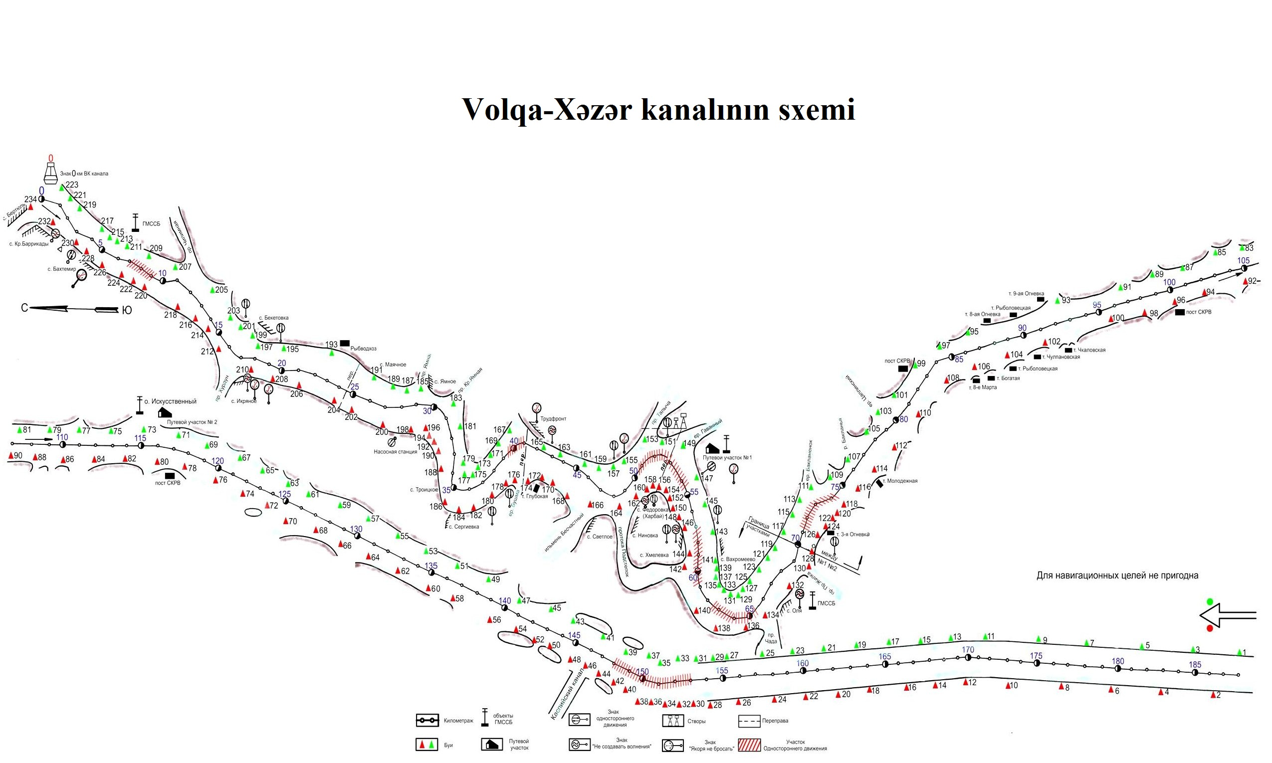 Volqa çayının deltalarından birinin qolu olan Baxtemir çayının dərinsulu hissələrindən birini və Xəzər dənizinin dərinsulu hissəsi ilə Volqa deltasının azsulu hissəsini birləşdirən kanal.